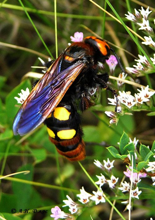 Балка Плоська, Лутугинський район, околиці с. Розкішне